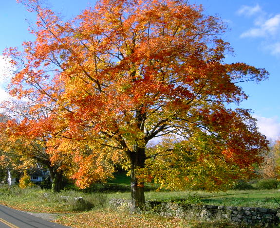 Indian Summer; Ahornbaum am Straßenrand, Lake Candlewood, Connecticut, USA